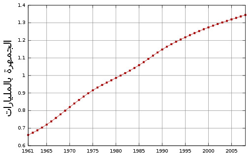 جمهرة الصين من سنة 1961 حتى سنة 2008. المصدر: FAO. تاريخ الوصول: 2011-03-30. China's population (1961-2008).